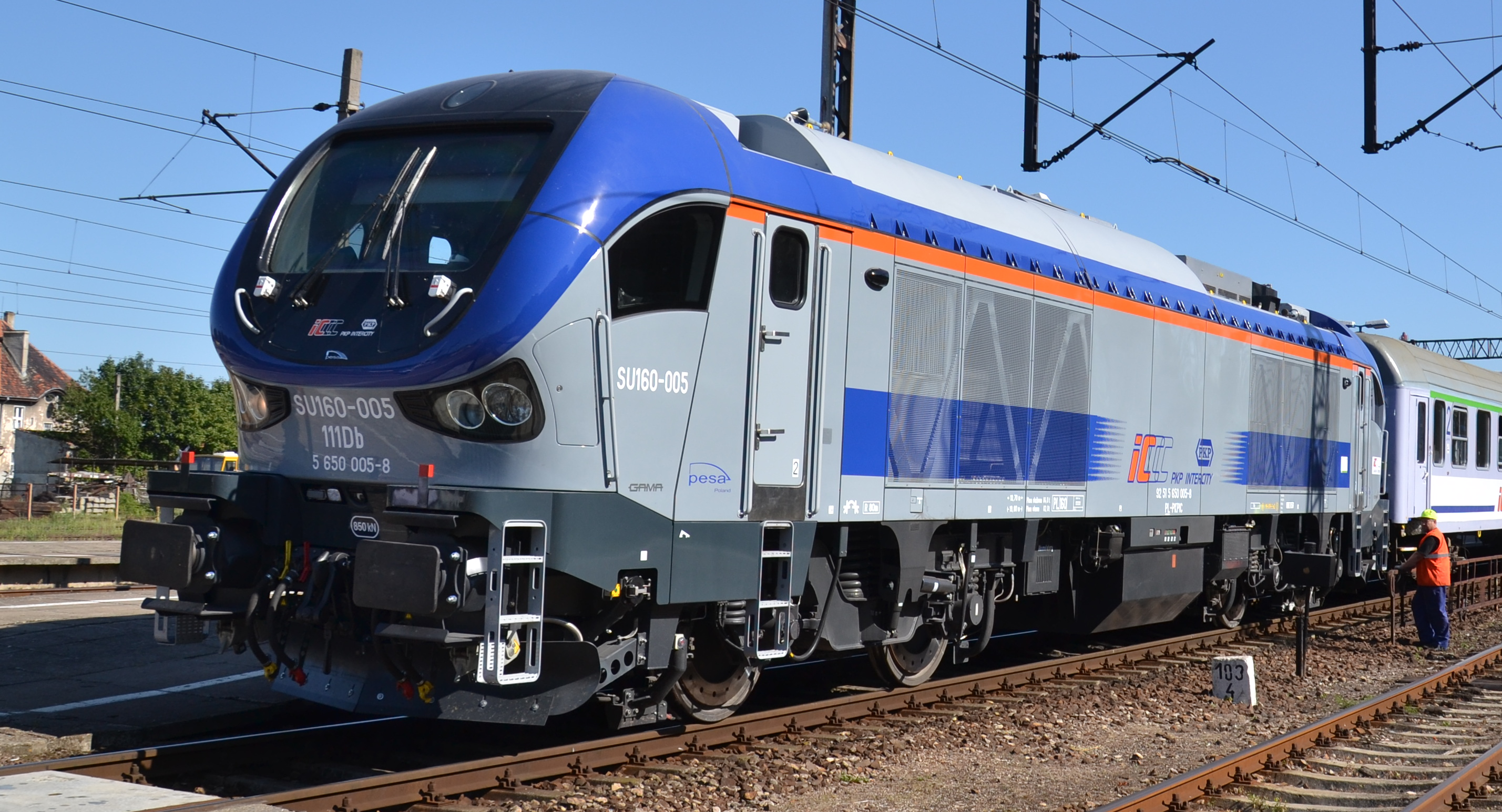 Spalinowóz SU160-005 produkcji Pesa Bydgoszcz z TLK Pojezierze na stacji Ełk This photo was taken during Railway Wikiexpedition 2015 set up by Wikimedia Polska Association in cooperation with Fundacja Grupy PKP.You can see all photographs in category Wikiekspedycja kolejowa 2015.